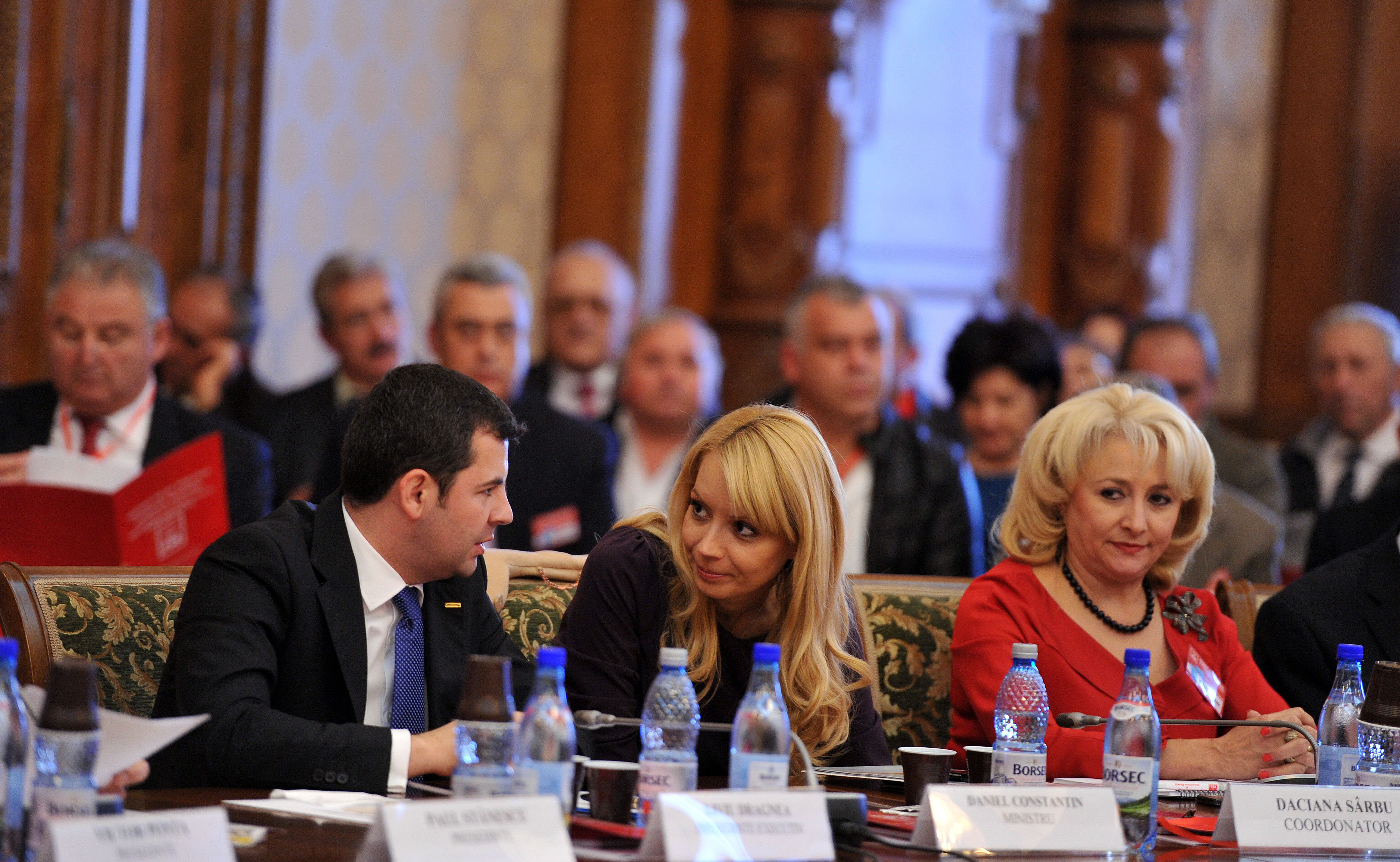 Daciana Sarbu si Viorica Dancila la Atelierele Viitorului - Editia a III-a, Palatul Parlamentului